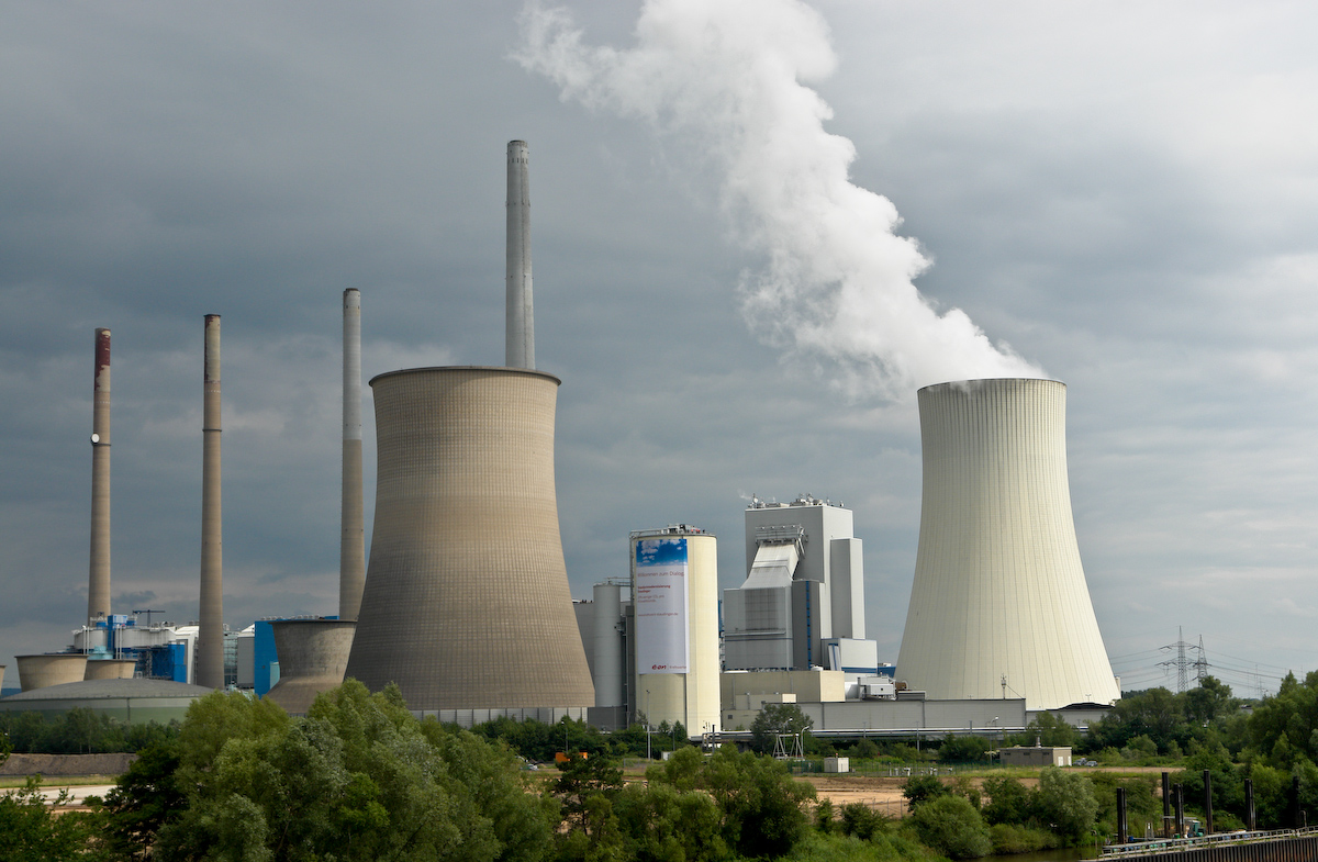 Kraftwerk Staudinger von der Limes-Brücke